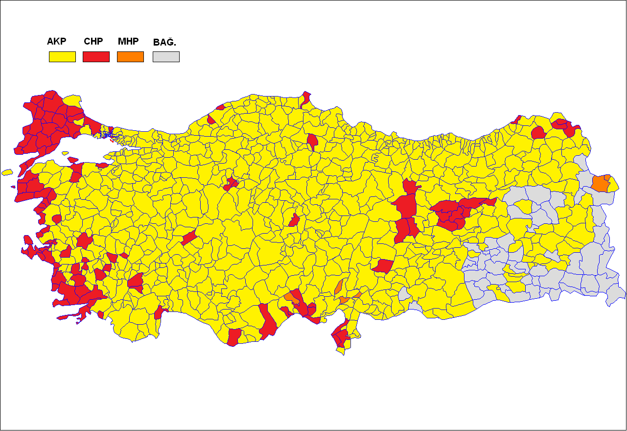 2011 seçimleri ilçeler